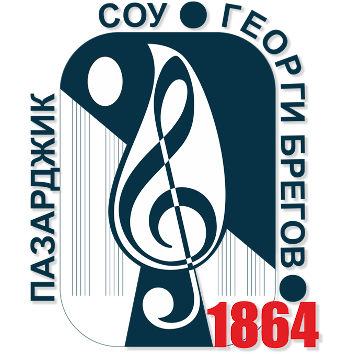 Официално лого на СОУ „Георги Брегов“ от 2014 г.